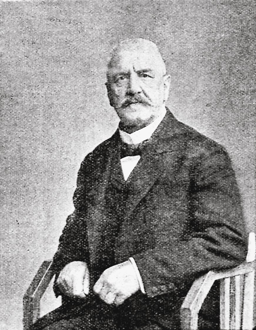 Rudolf Thiel legte sein Amt in der Bürgerschaft nieder.